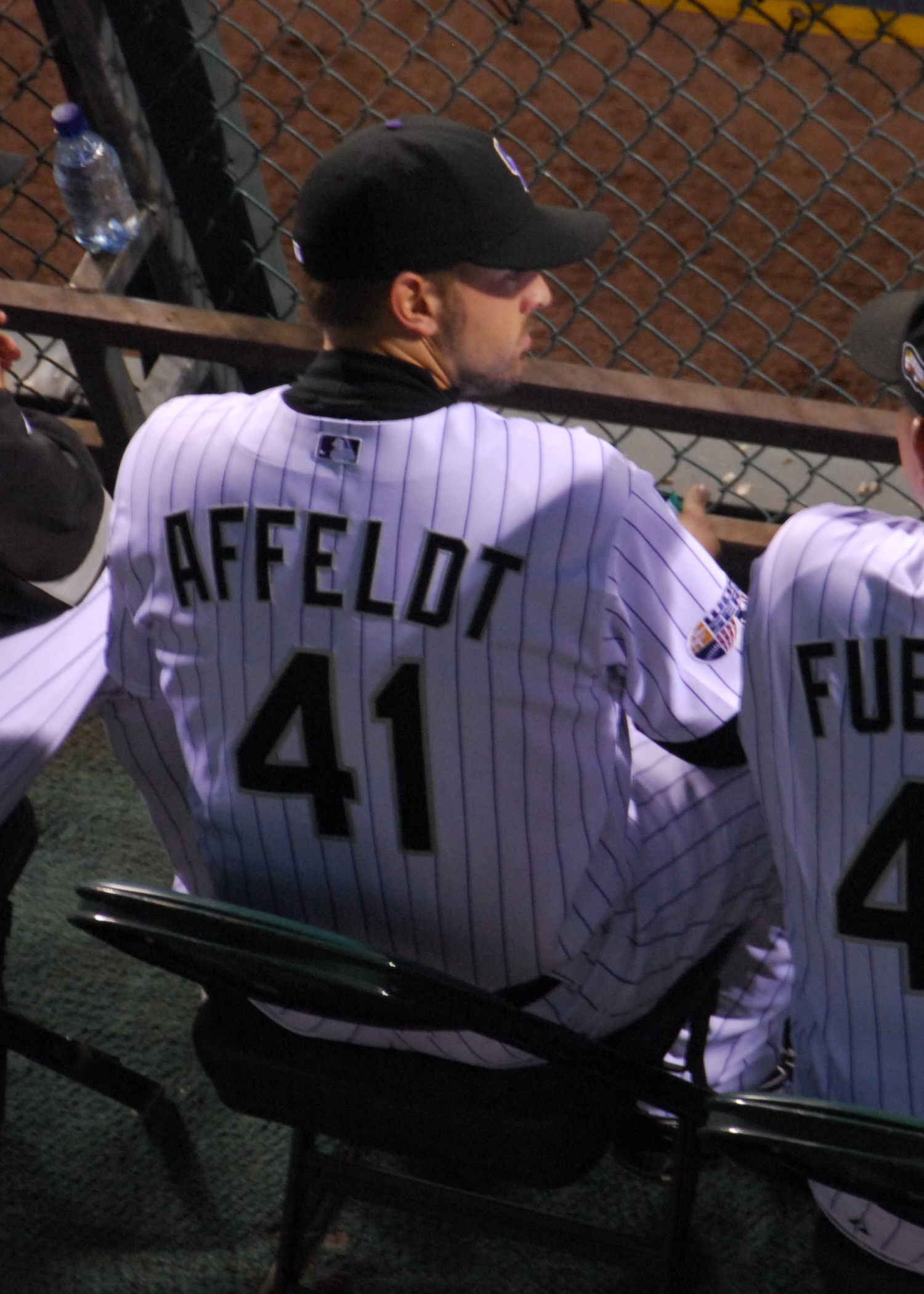 Jeremy Affeldt